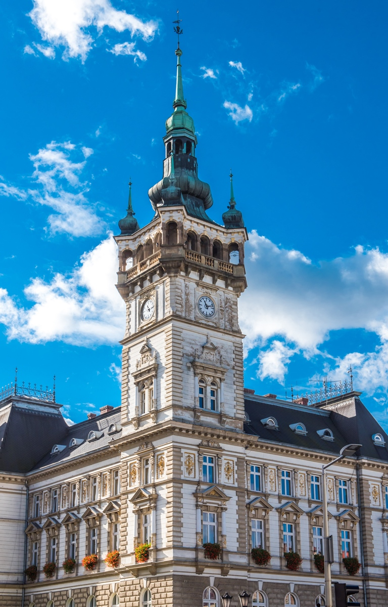 Bielsko-Biała Ratusz